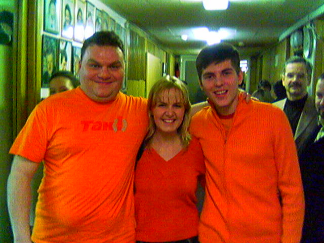 Александр Плющев, Ксения Туркова, Дмитрий Борисов